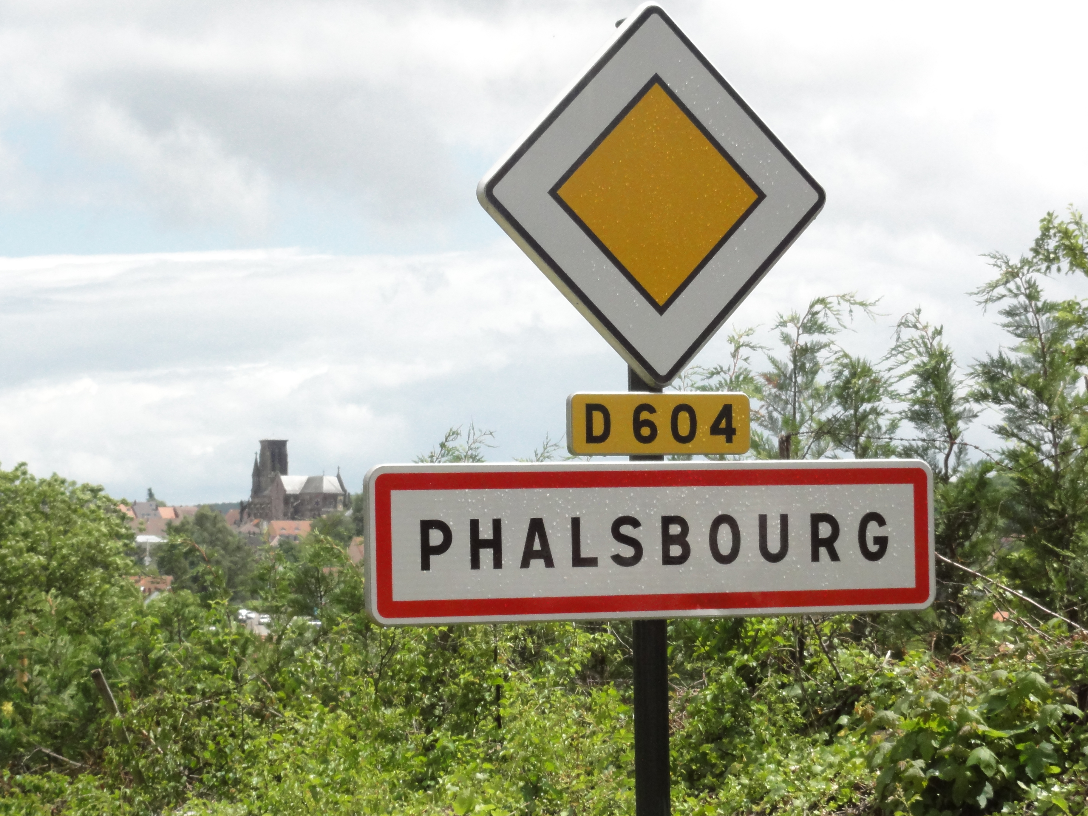 Phalsbourg (Moselle) city limit sign